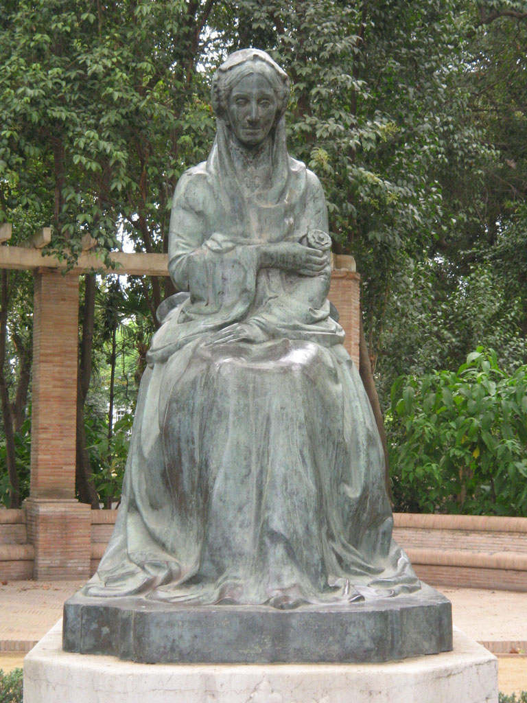 Estatua de bronce de la Infanta de España Mª Luisa Fernanda de Enrique Pérez Comendador